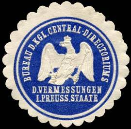 Sealing stamp Title: Bureau des Königlichen Central - Directoriums der Vermessungen im Preussischen Staate Description: blau, weiß, geprägt Place: size: 4 cm